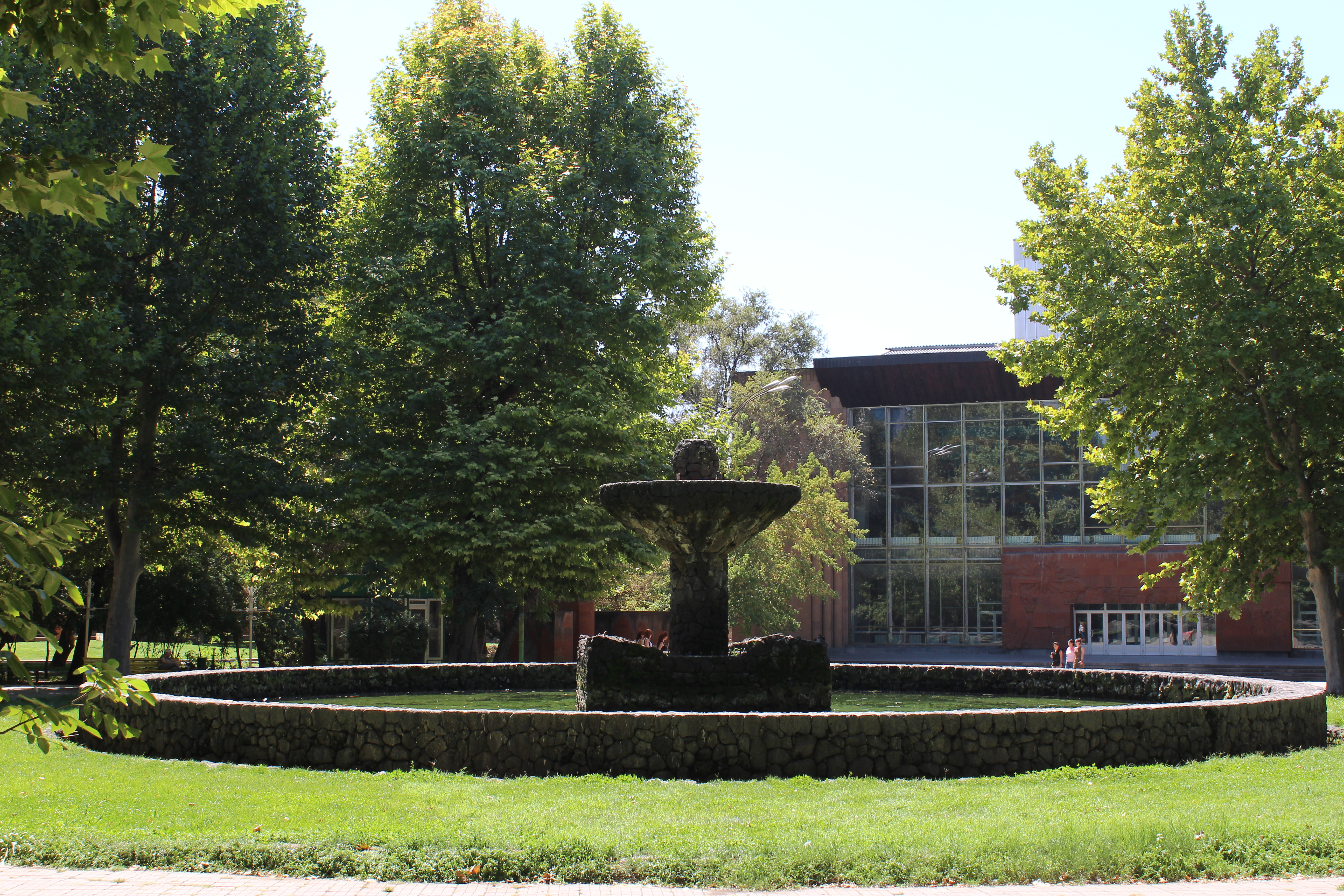 Անգլիական այգու շատրվանը